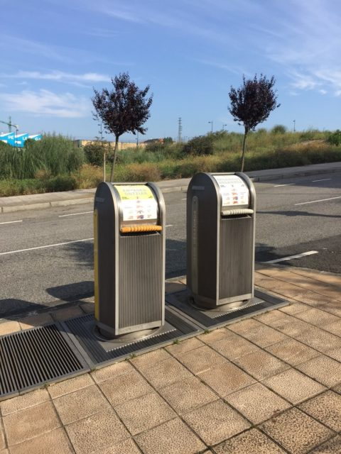 2 כני אשפה כסופים